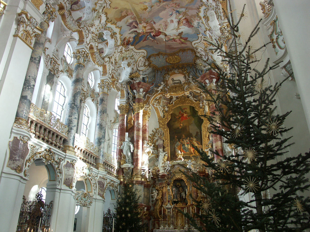 Wies church (Wieskirche), Germany